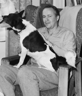 bolig, interiør, stue, mann, kvinne, ektepar, skuespillere, katt, hund. Rigmor Dahl Delphin (1908-1993) var ansatt som fotograf i ukebladet Alle Kvinner. Hennes negativarkiv ble i 2005 overført Oslo Bymuseum fra Gyldendal Norsk Forlag som var utgiver av bladet.